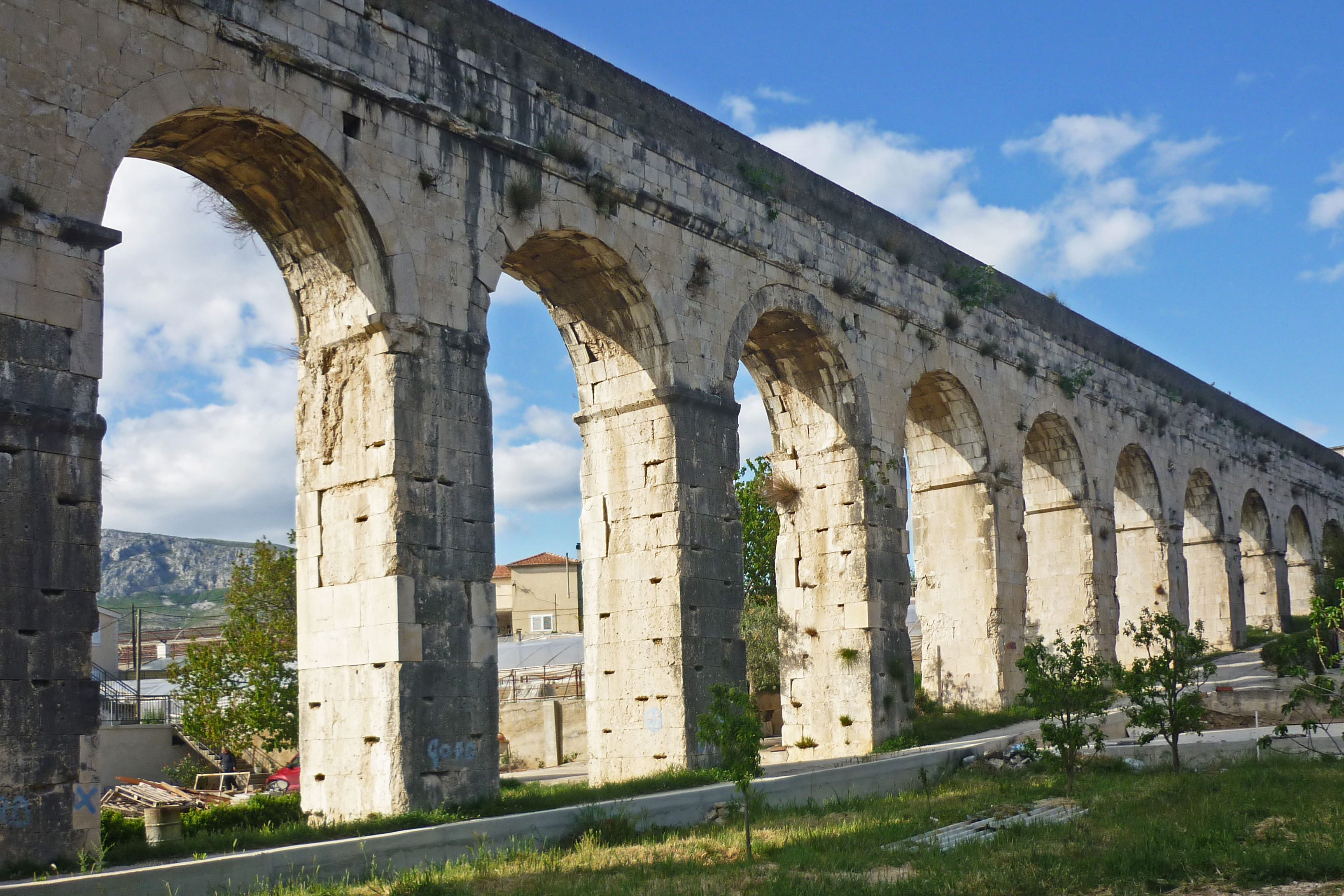 Diokletian-Aquädukt in Split (errichtet um 300)